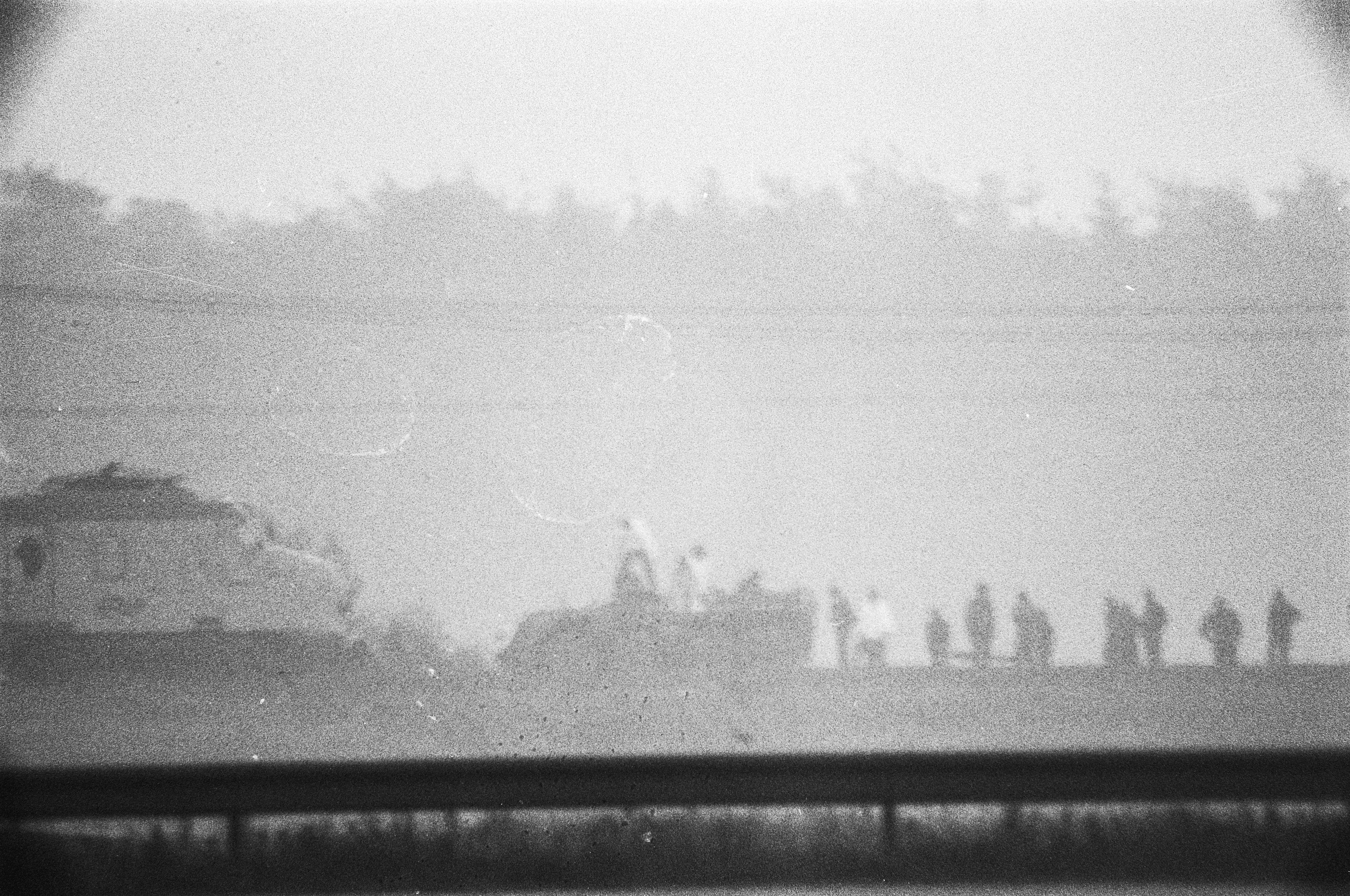 Collectie / Archief : Fotocollectie Anefo Reportage / Serie : [ onbekend ] Beschrijving : Afloop gijzeling bij De Punt ; na actie mensen bij trein met brancards Datum : 11 juni 1977 Trefwoorden : BRANCARDS, gijzelingen, treinen Persoonsnaam : Punt, De Fotograaf : Suyk, Koen / Anefo Auteursrechthebbende : Nationaal Archief Materiaalsoort : Negatief (zwart/wit) Nummer archiefinventaris : bekijk toegang 2.24.01.05 Bestanddeelnummer : 929-2214